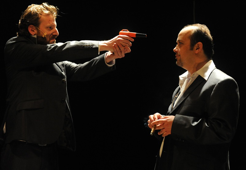 דודו ניב עם דיוויד לוינסקי במארי סטיוארט, בבימויו של עירא אבנרי, תיאטרון תמונע, 2012